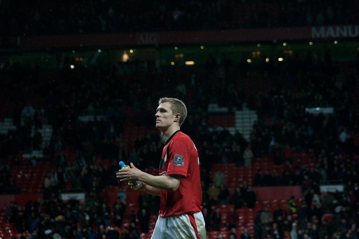 Darren Fletcher vs Everton, at Old Trafford, Manchester, November 2009.